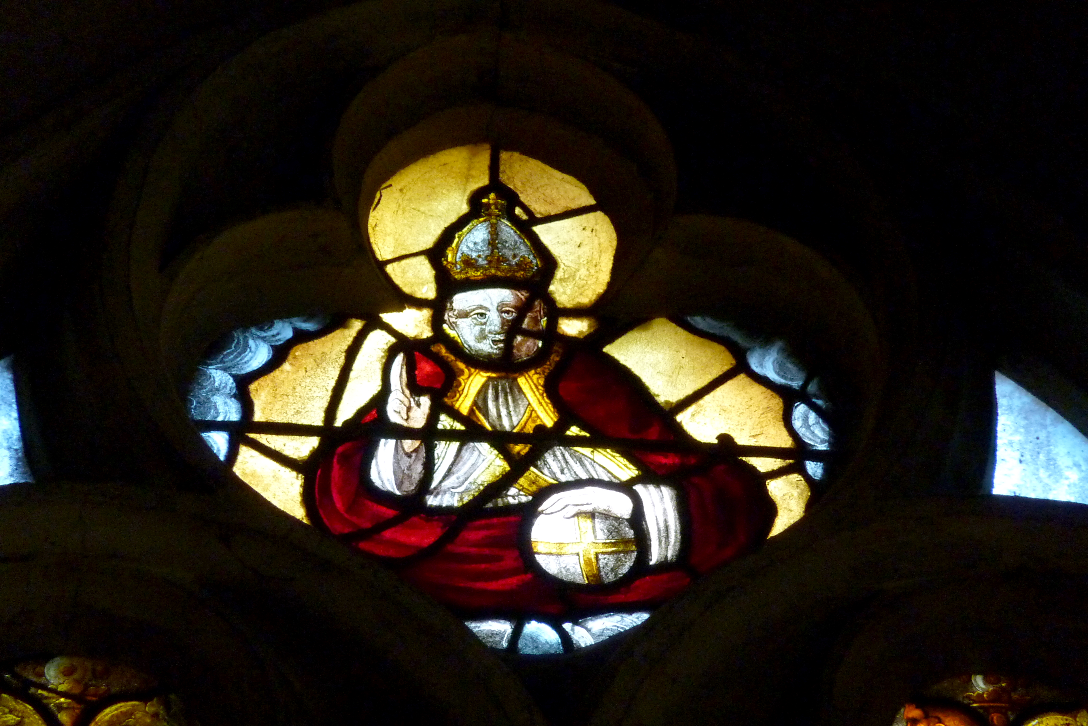 Katholische Pfarrkirche Saint-Martin in Herblay, einer Gemeinde im Département Val d'Oise (Île de France), Bleiglasfenster aus dem 16. Jh., Darstellung: Gottvater